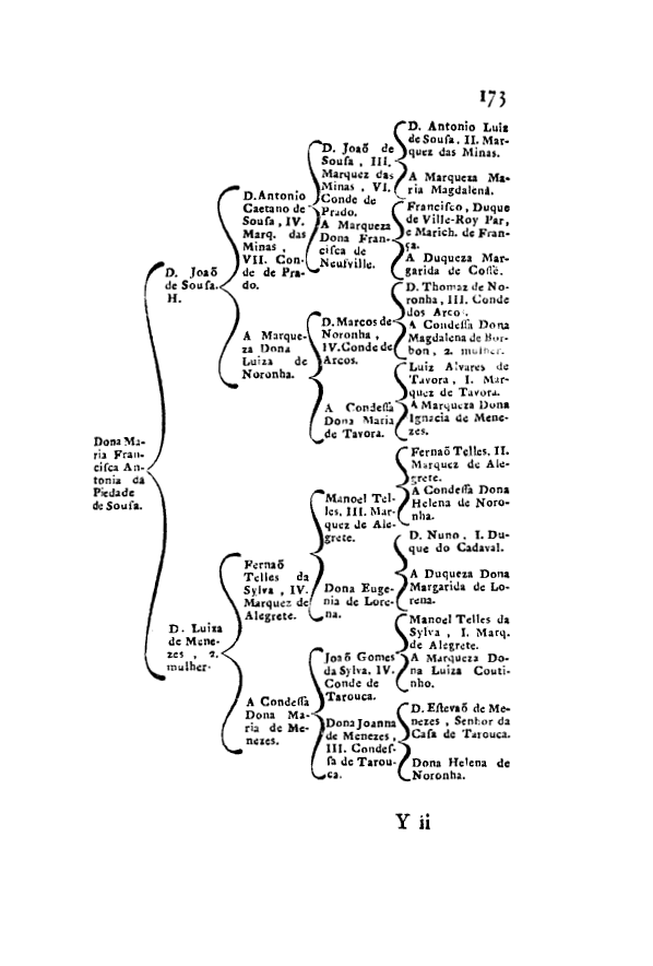 Memorias Historicas e Genealogicas dos Grandes de Portugal - Costados da 5.ª Marquesa das Minas